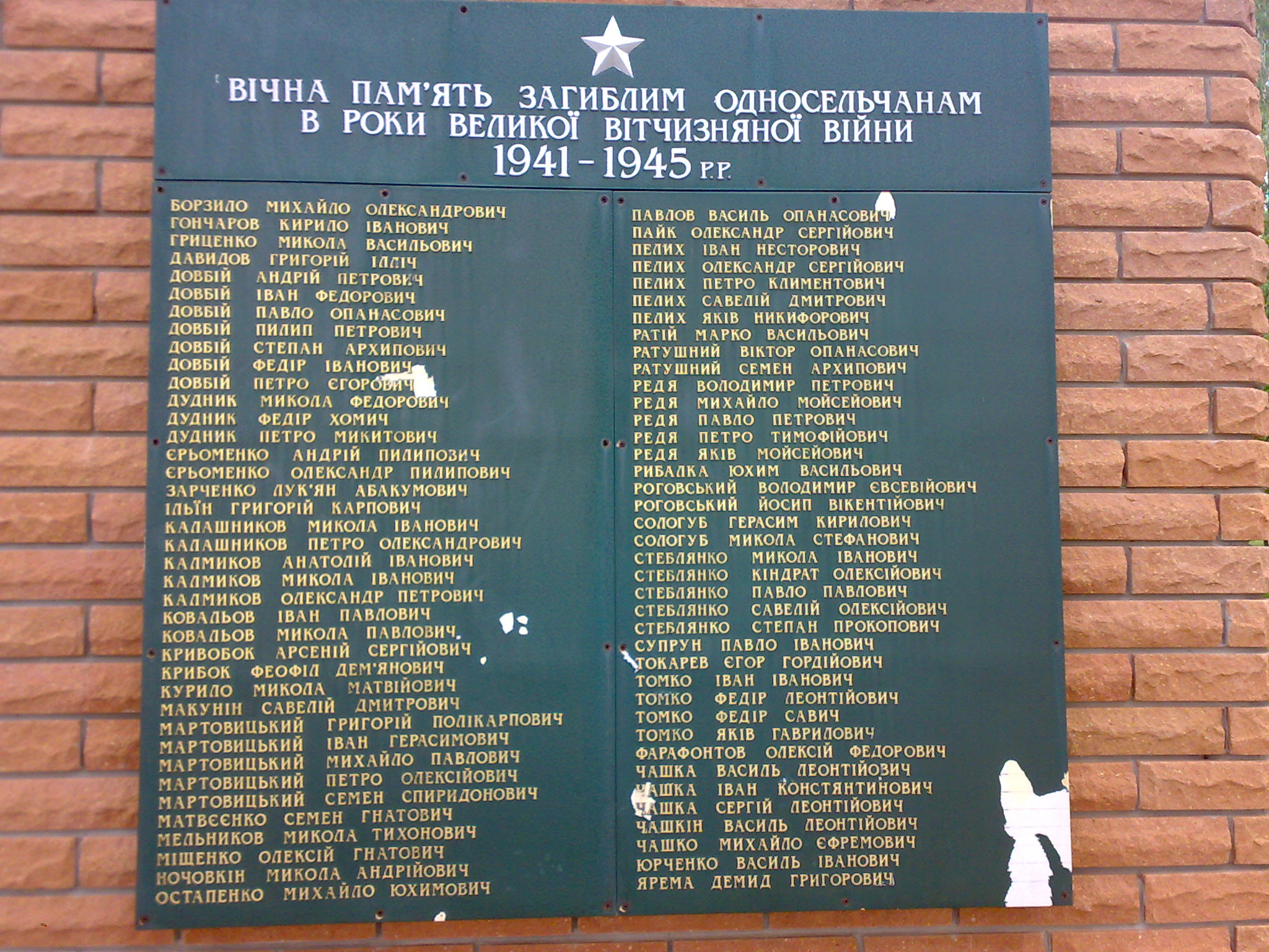 Братська могила радянських воїнів. Поховано невідома кількість. До цієї могили перенесена братська могила з с. Ревучого., Берестове